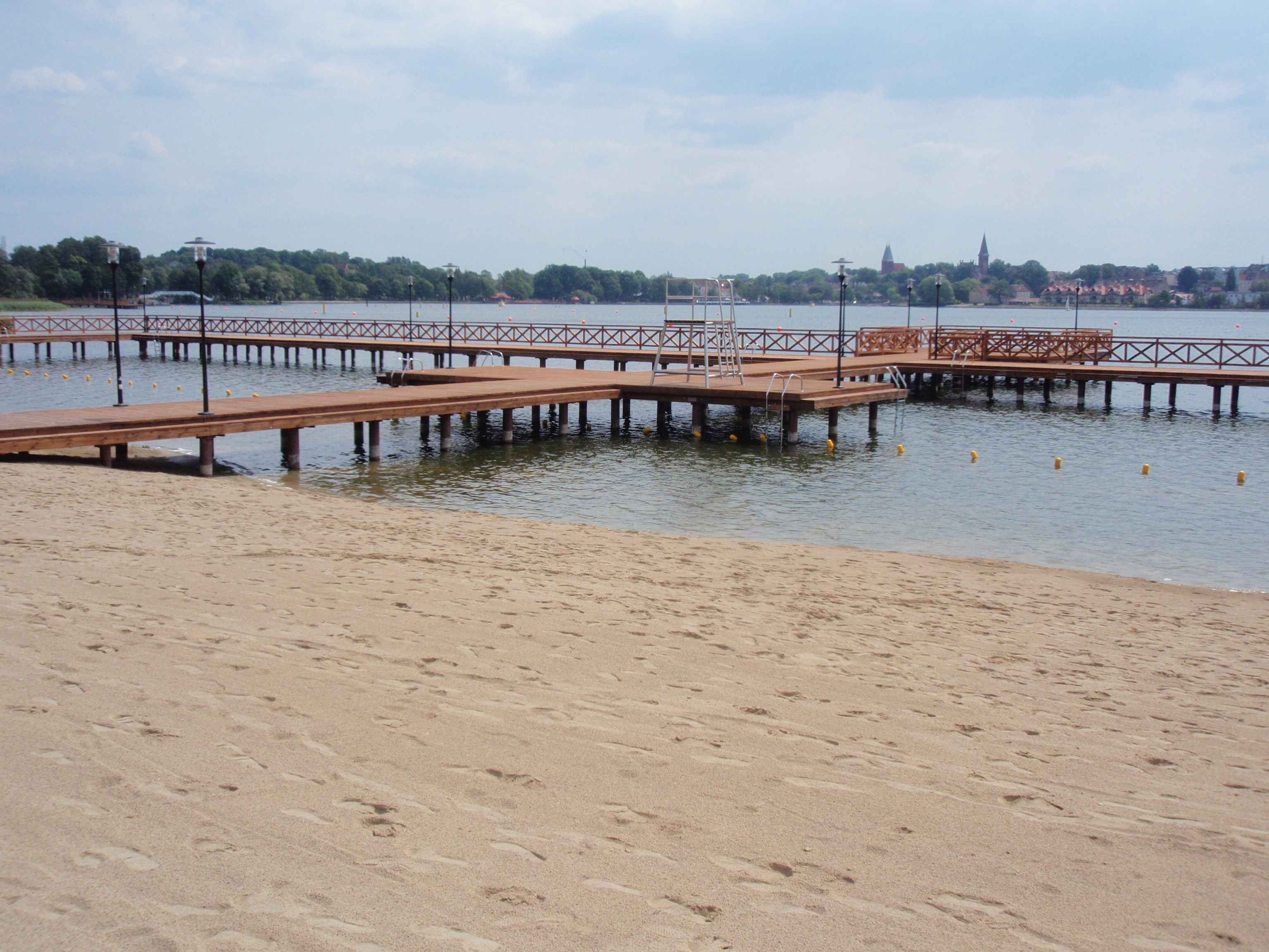 Plaża miejska nad Jeziorem Drweckim, w Ostródzie